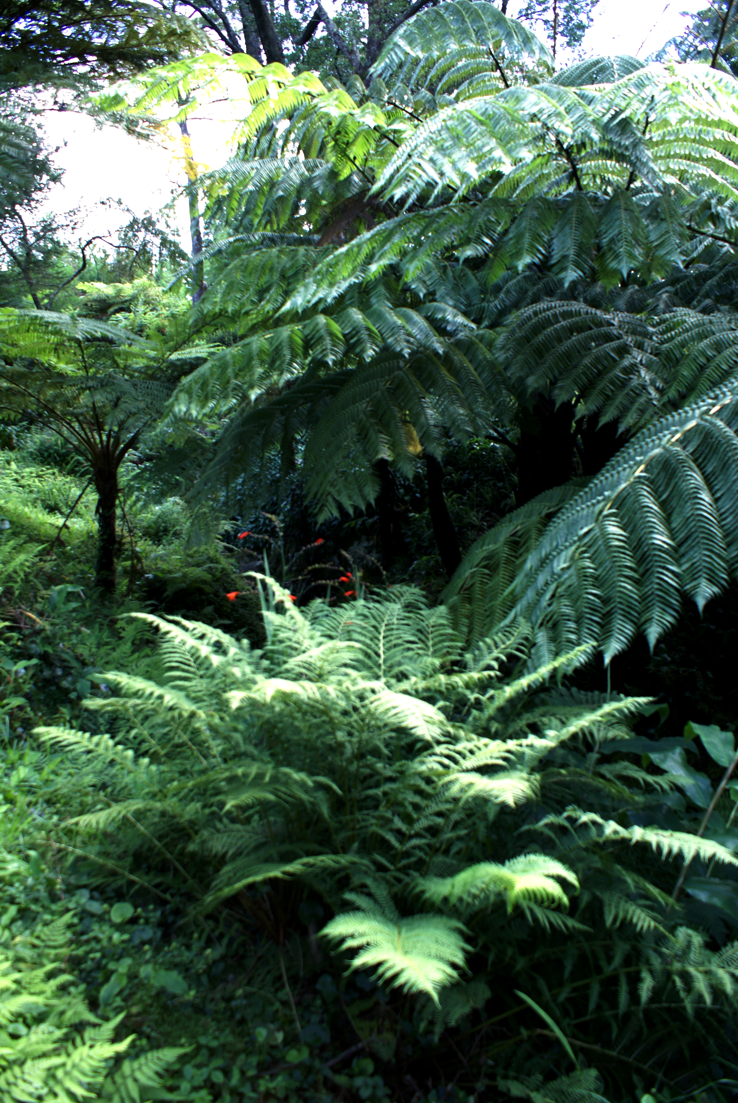 Parque Florestal da Silveira, fetos arbóreos de grande dimensão, Ribeira Seca, Calheta, ilha de São Jorge, Açores